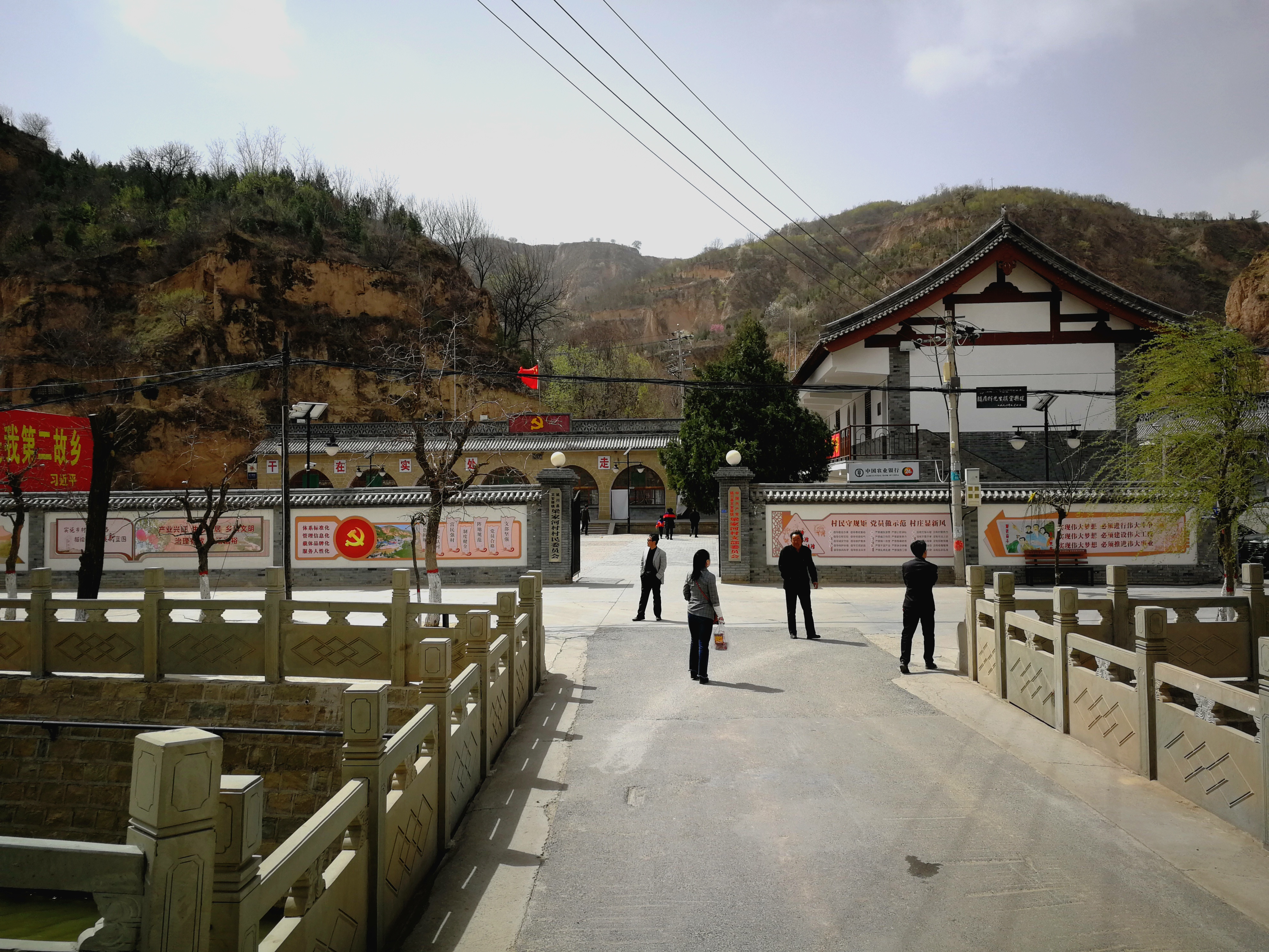 延安市延川县文安驿镇梁家河村